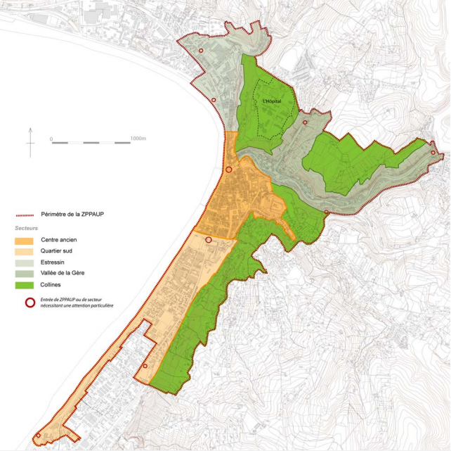 Carte de la Zone de Protection du Patrimoine Architectural, Urbain et Paysager (ZPPAUP) exisatnt à Vienne depuis 2009.